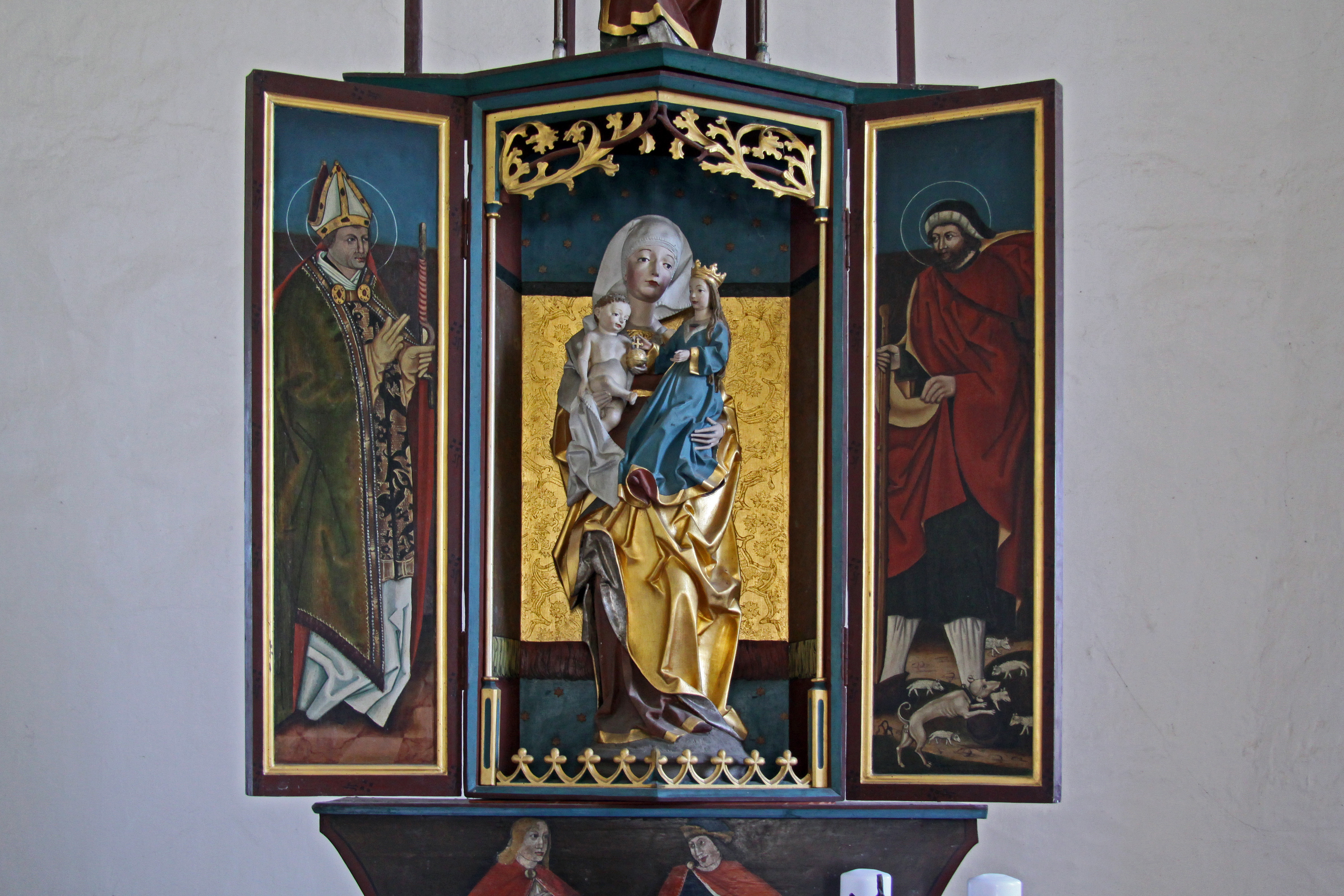 Kirche in Nauhain, Altar mit Anna Selbdritt, Erasmus und Wendelin